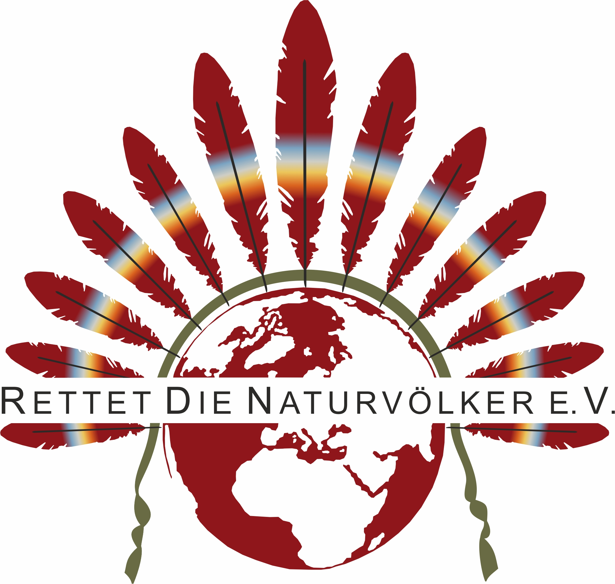 Logo des Vereines Freunde der Naturvölker e.V., Reiterweg 10, 19288 Ludwigslust